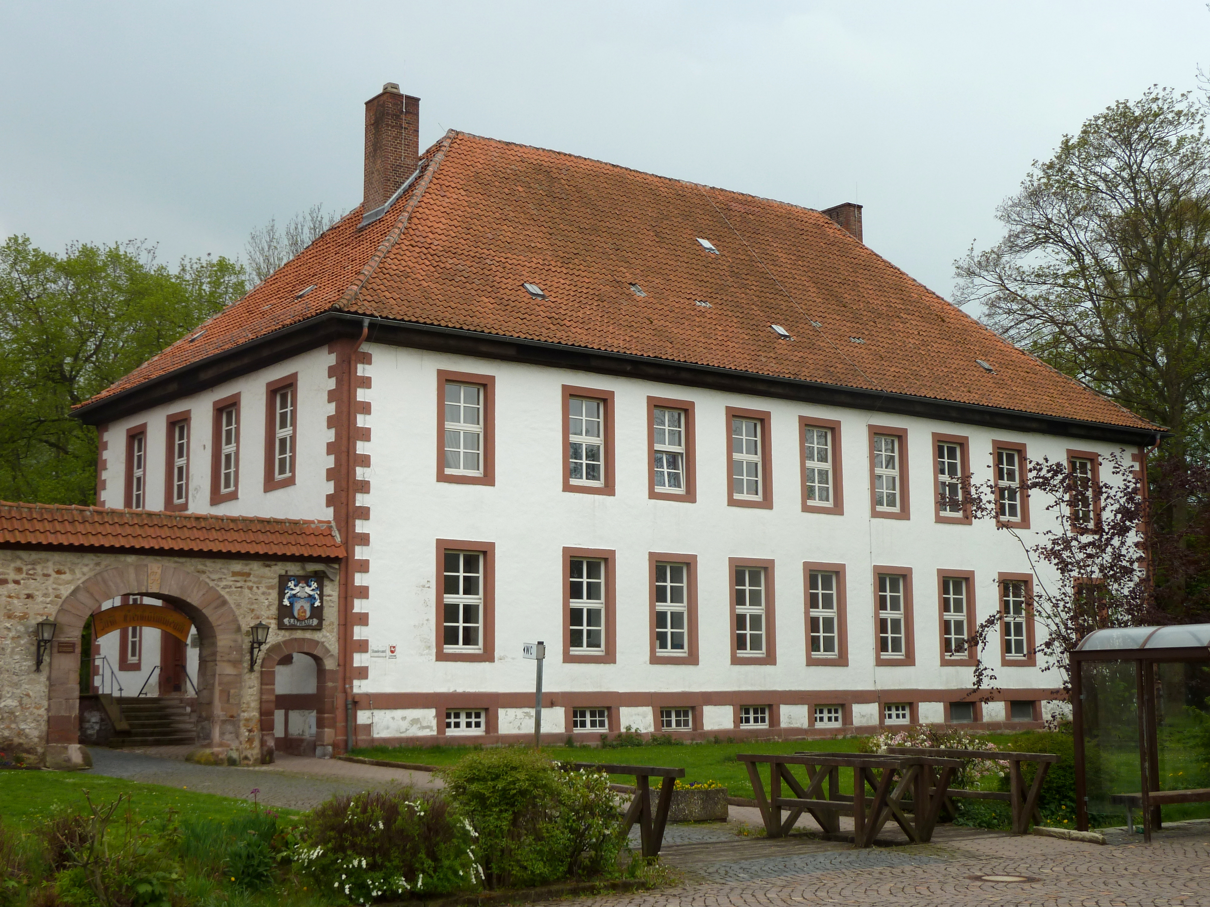 Ehemaliges Amtshaus in Moringen, Landkreis Northeim, SÜdniedersachsen. Erbaut 1721 anstelle des Wohnturms der mitelalterlichen Burganlage, zunächst als Amtshaus genutzt,von 1852 bis 1973 Amtsgericht, seit 1975 Rathaus von Moringen